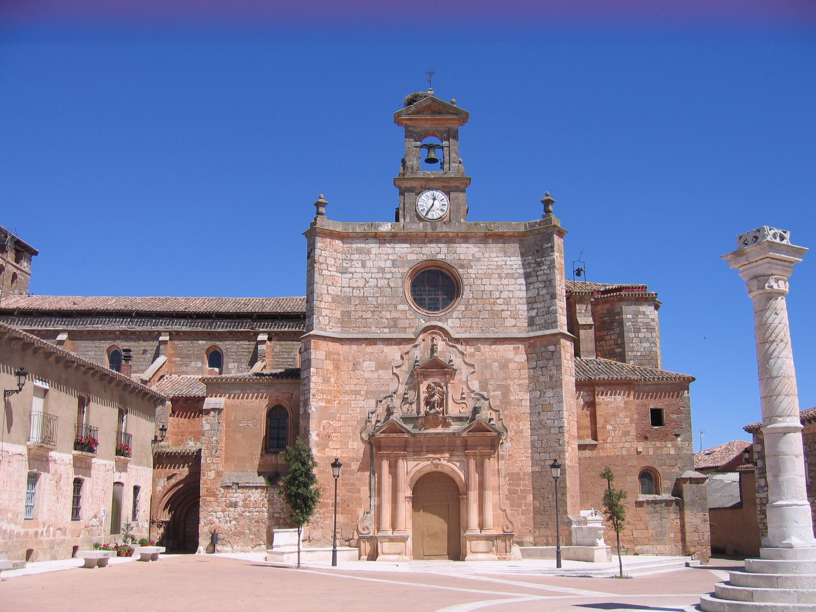 Fachada sur de la Iglesia de San Miguel. Portada barroca (s-XVIII)